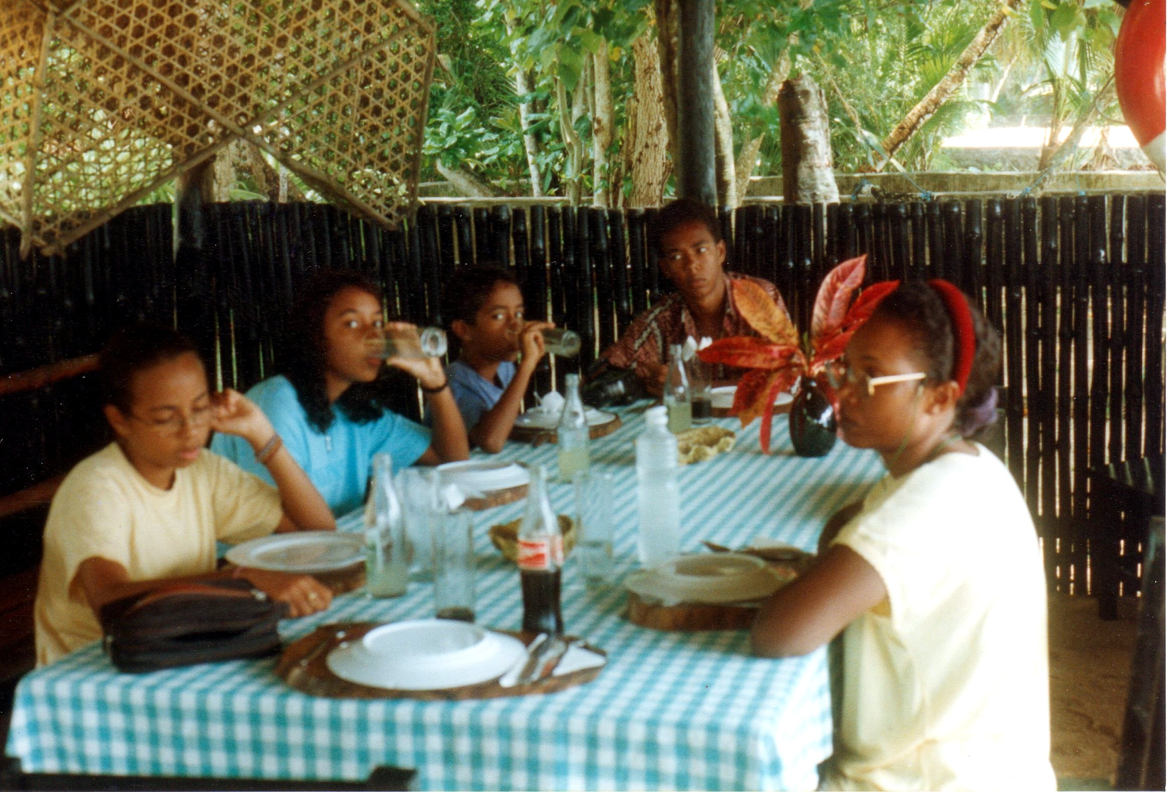 La Sirène